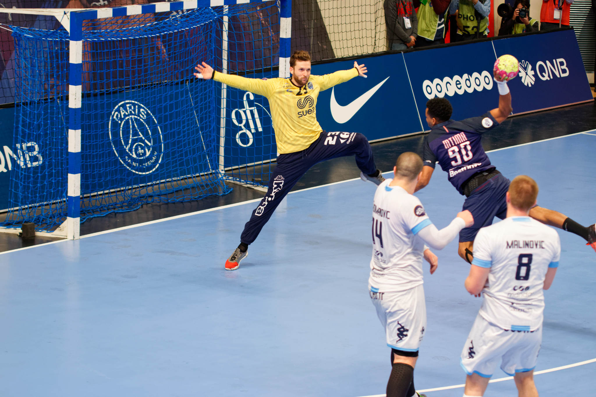 Rencontre de championnat de LidlStarLigue entre le PSG et l'US Créteil. A Coubertin, le 14 décembre 2016.